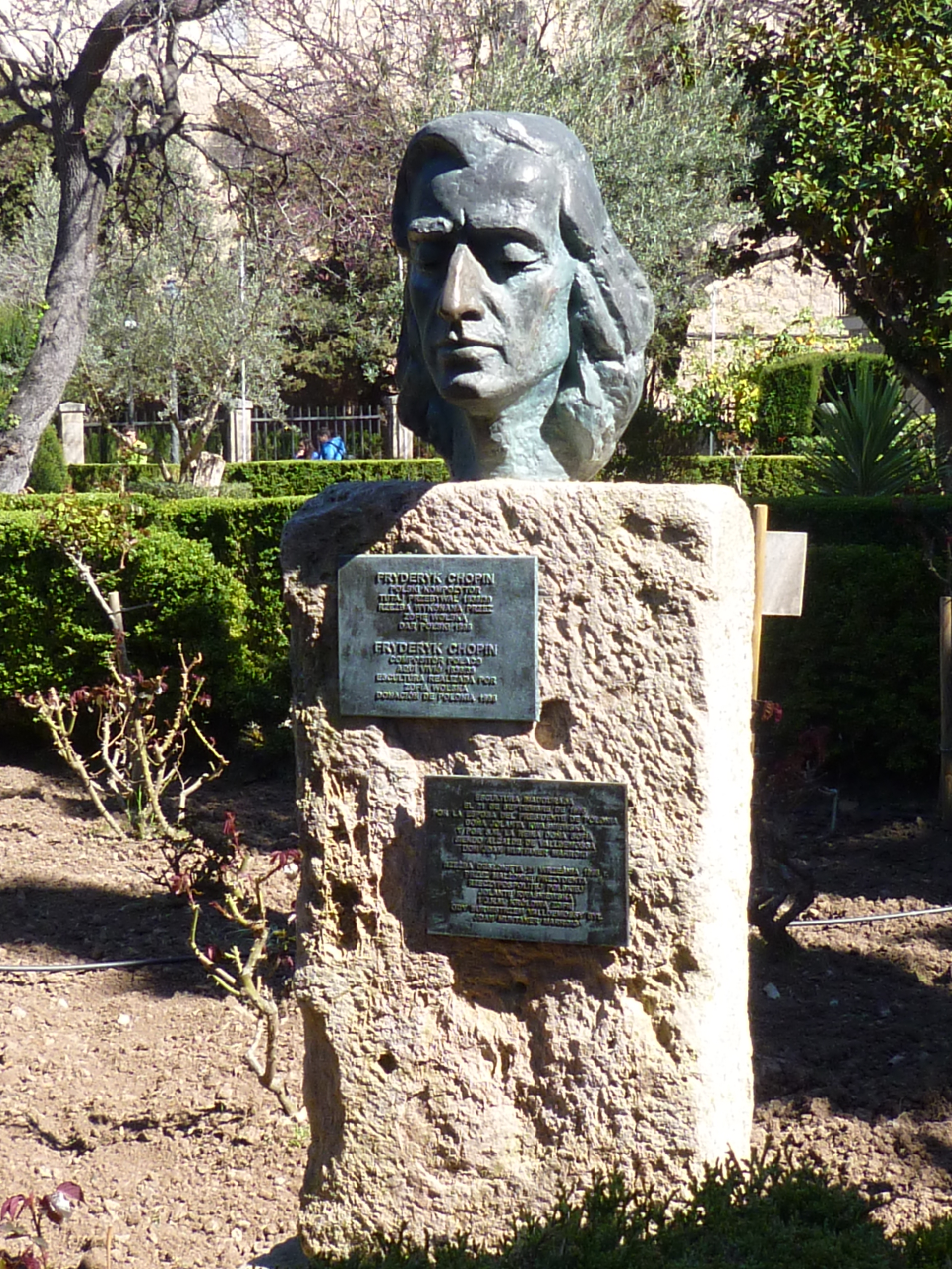 Statue von Frederic Chopin im Garten der Karthause in Valldemossa/Mallorca.